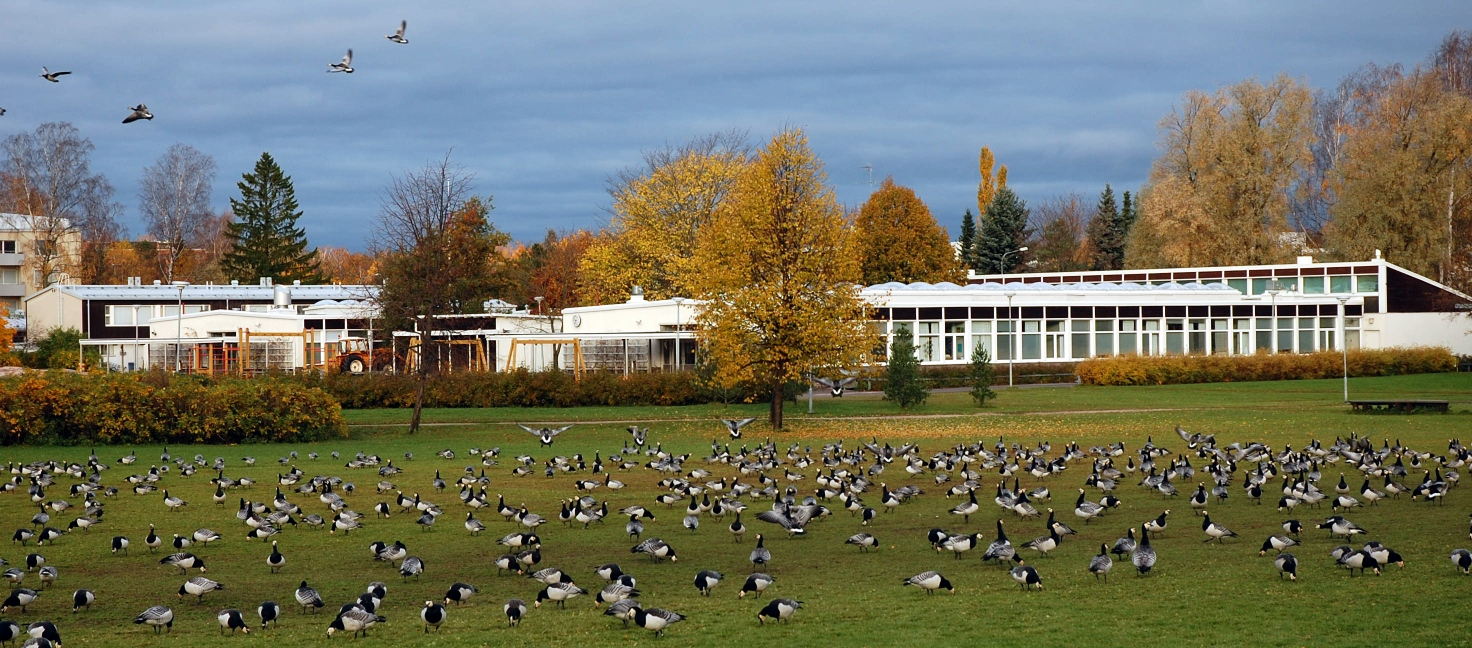 Aarnivalkean koulu Espoon Tapiolassa kuvattuna Silkkiniityn puolelta. Syksyllä valkoposkihanhet kerääntyvät suuriksi parviksi Silkkiniityn nurmialueille.